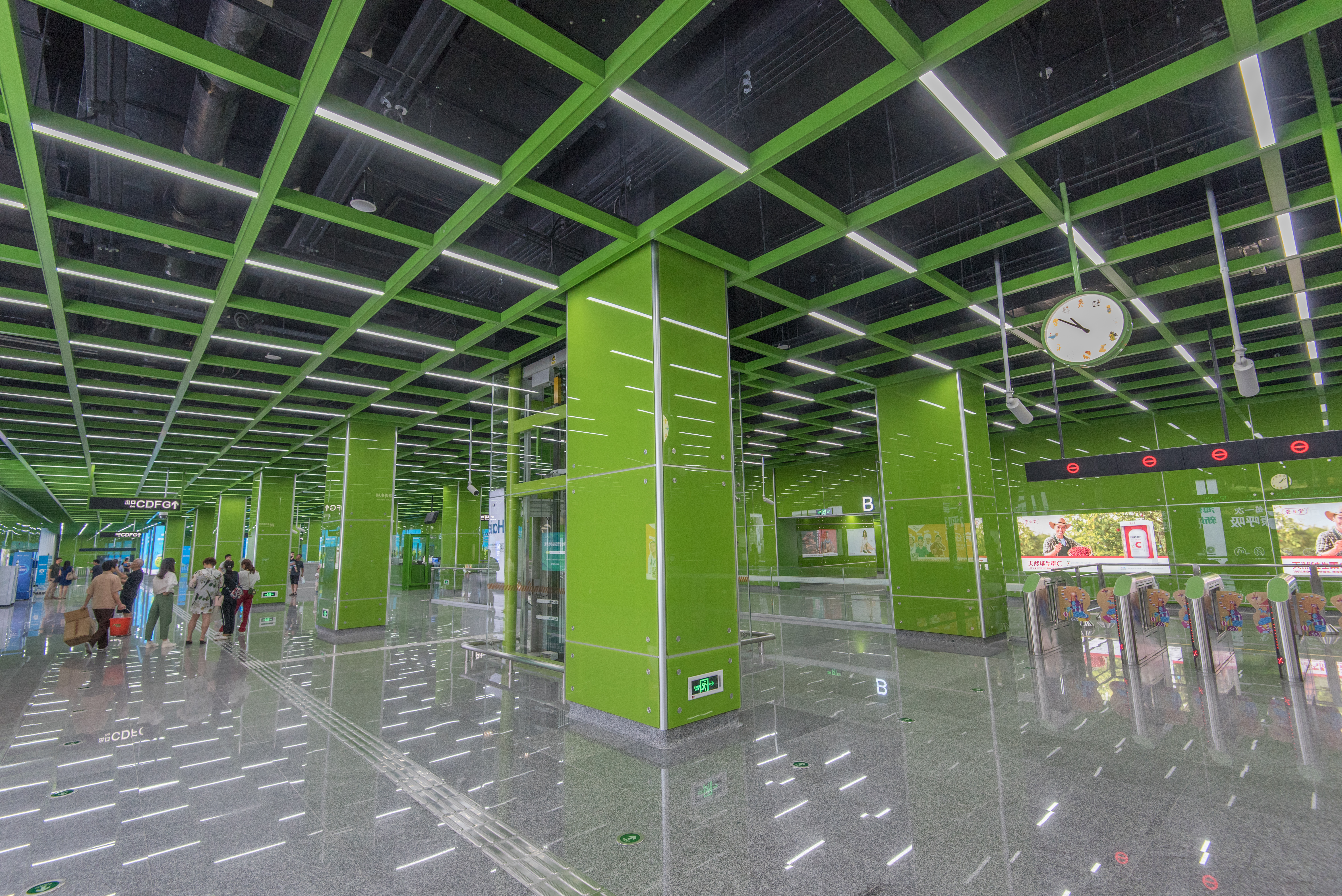 宁波地铁儿童公园站